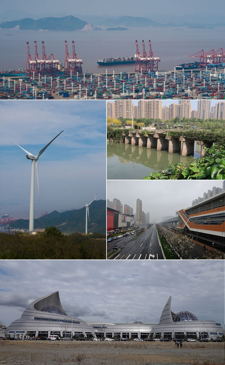 宁波市北仑区拼贴画